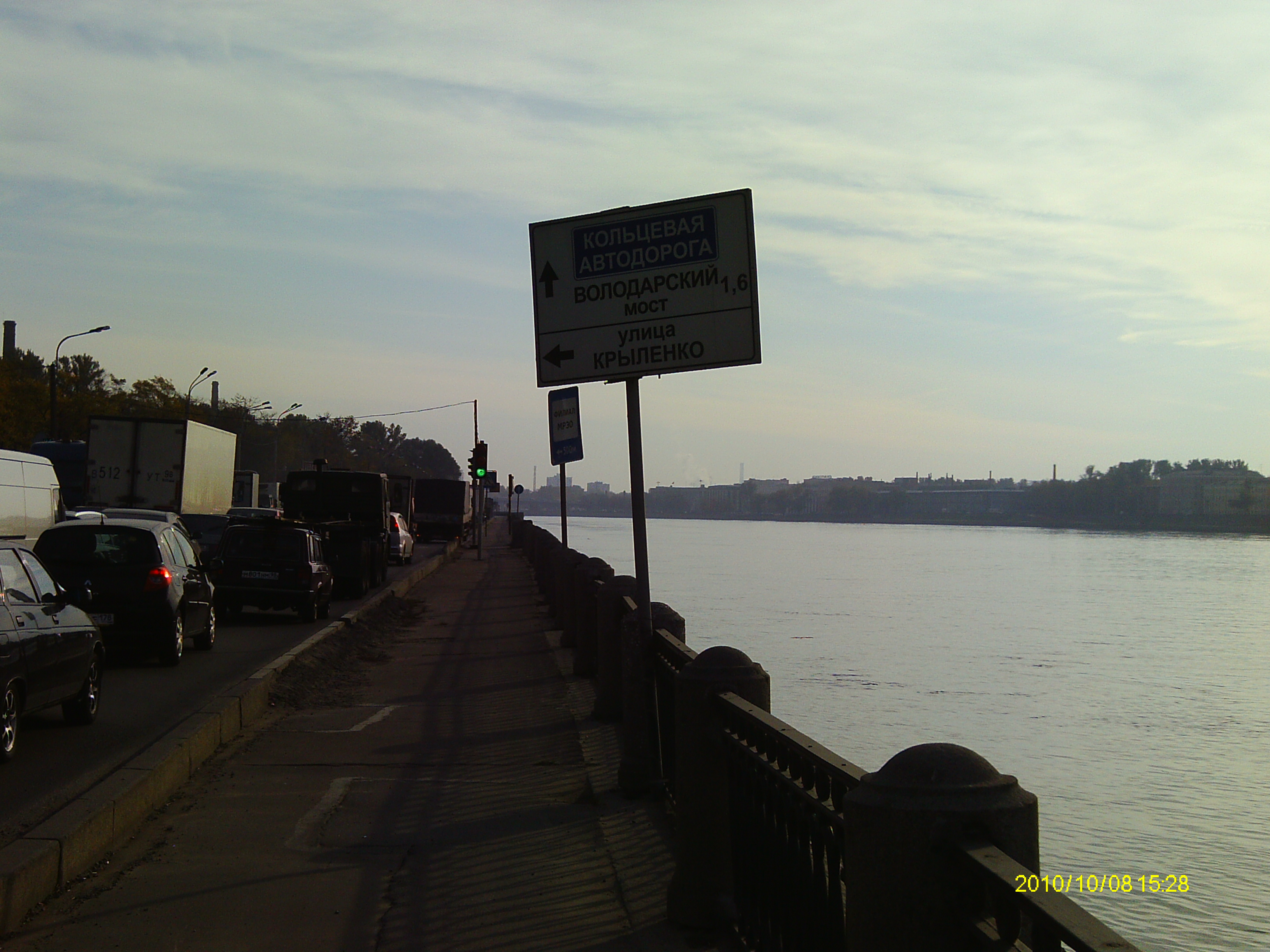 Угол Октябрьской набережной и улицы Крыленко